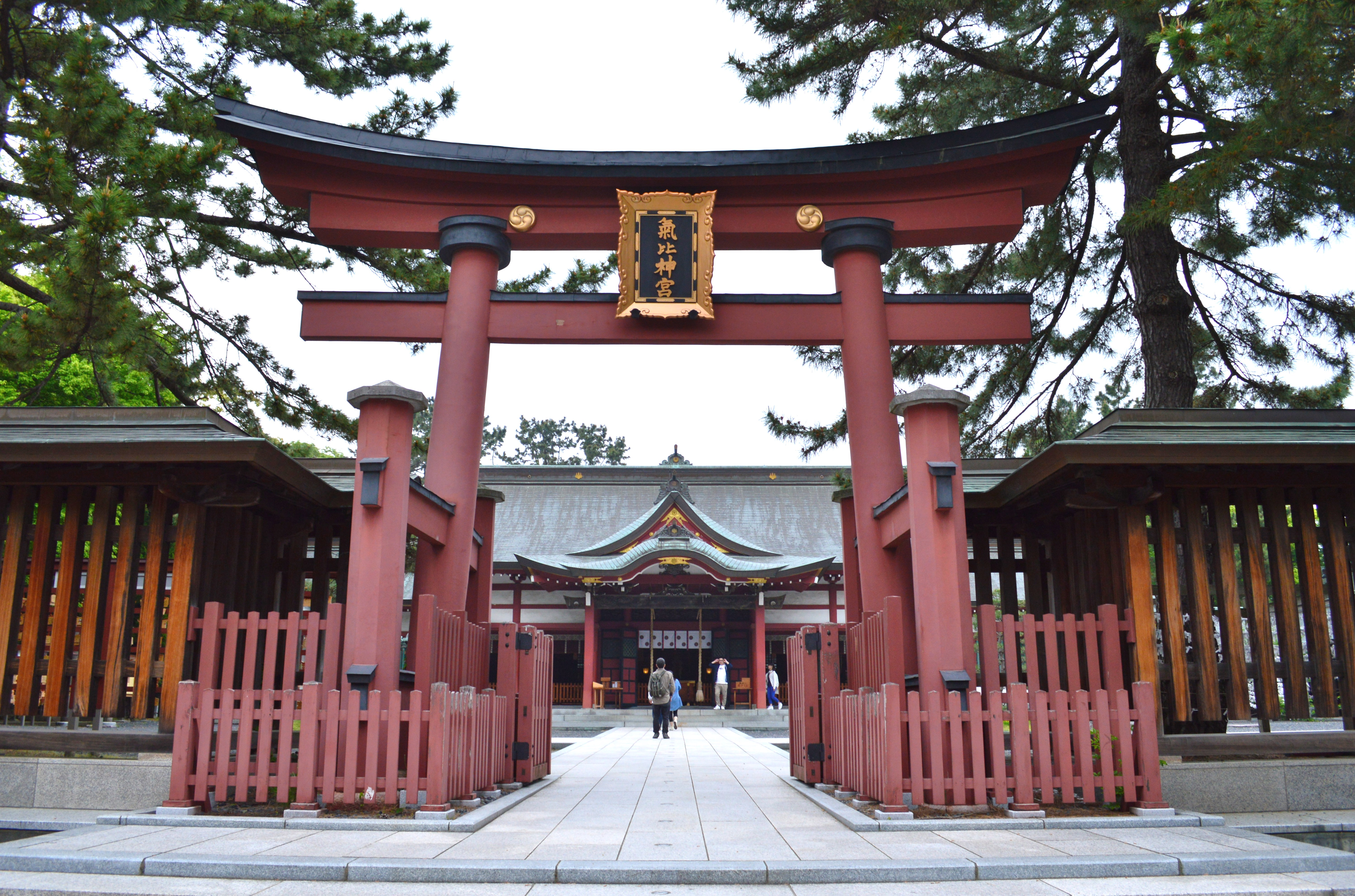 氣比神宮 中鳥居